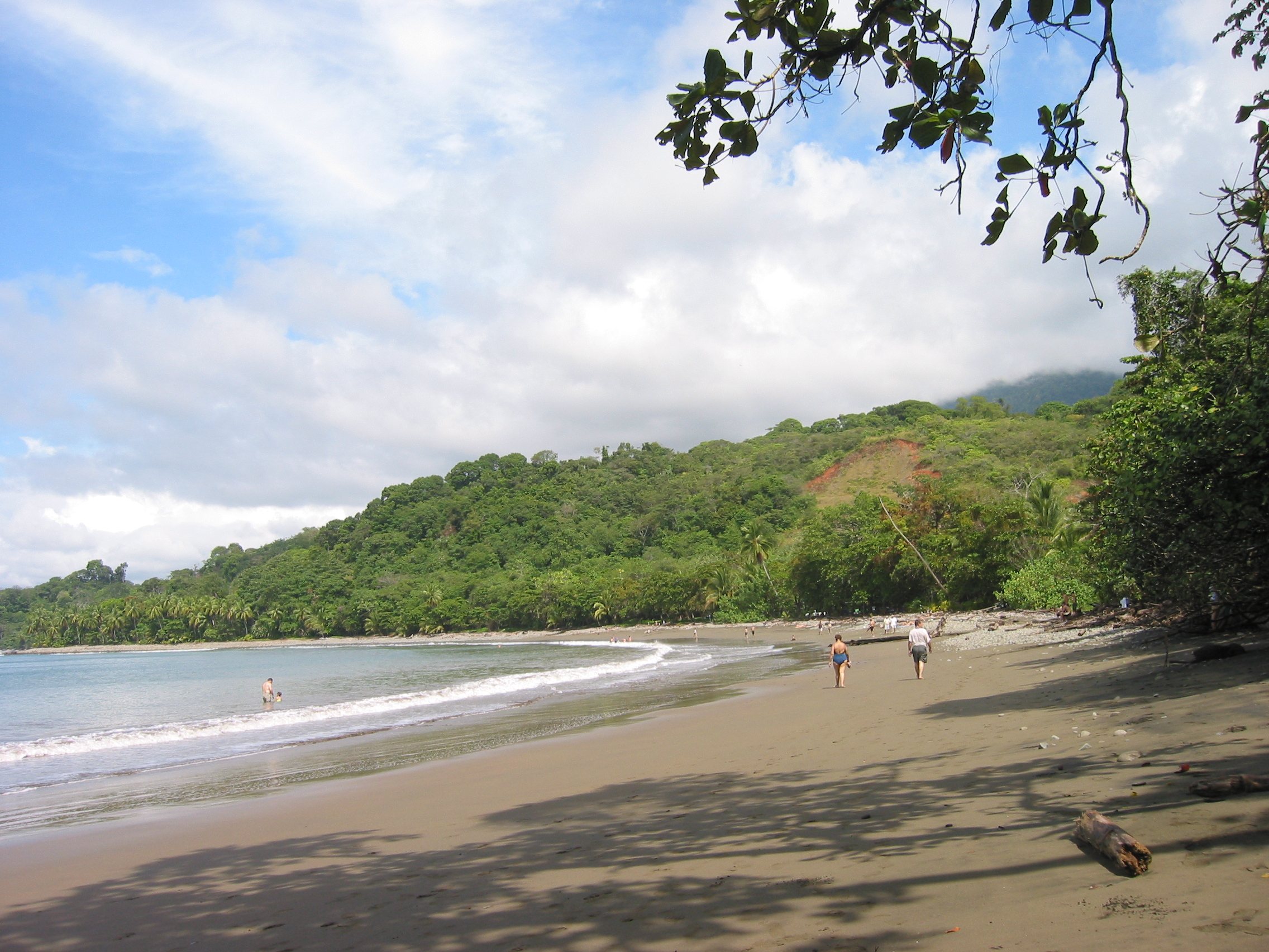 Playa Piñuela en el Parque Marino Ballena, Costa Rica